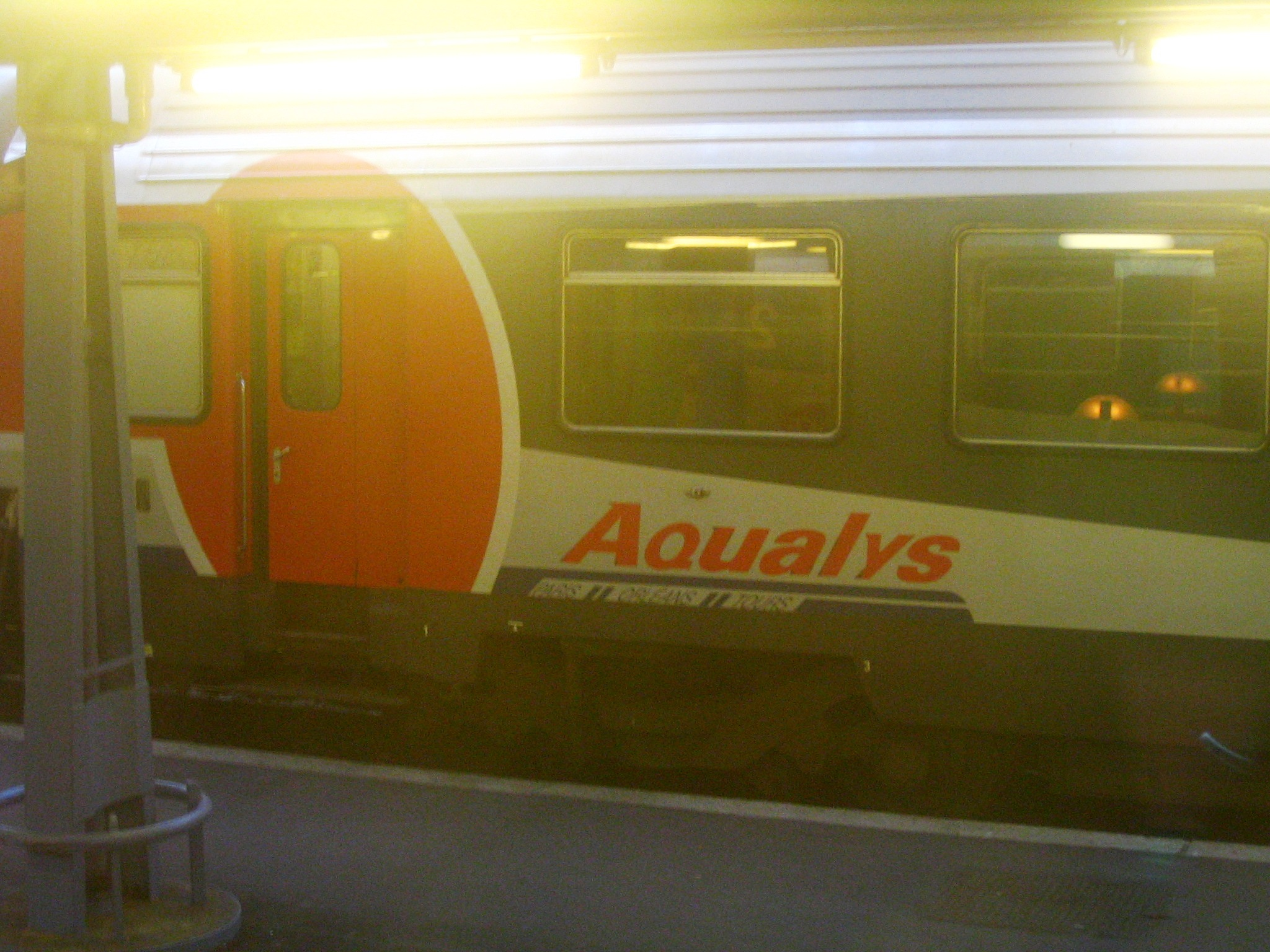 Cette image est une photographie, prise malheureusement face à une lampe d'une Voiture Corail en livrée Aqualys en gare de Paris-Austerlitz le 22 août 2006. La porte ici est une porte de voiture de première classe, et d'une voiture corail dite "coach".